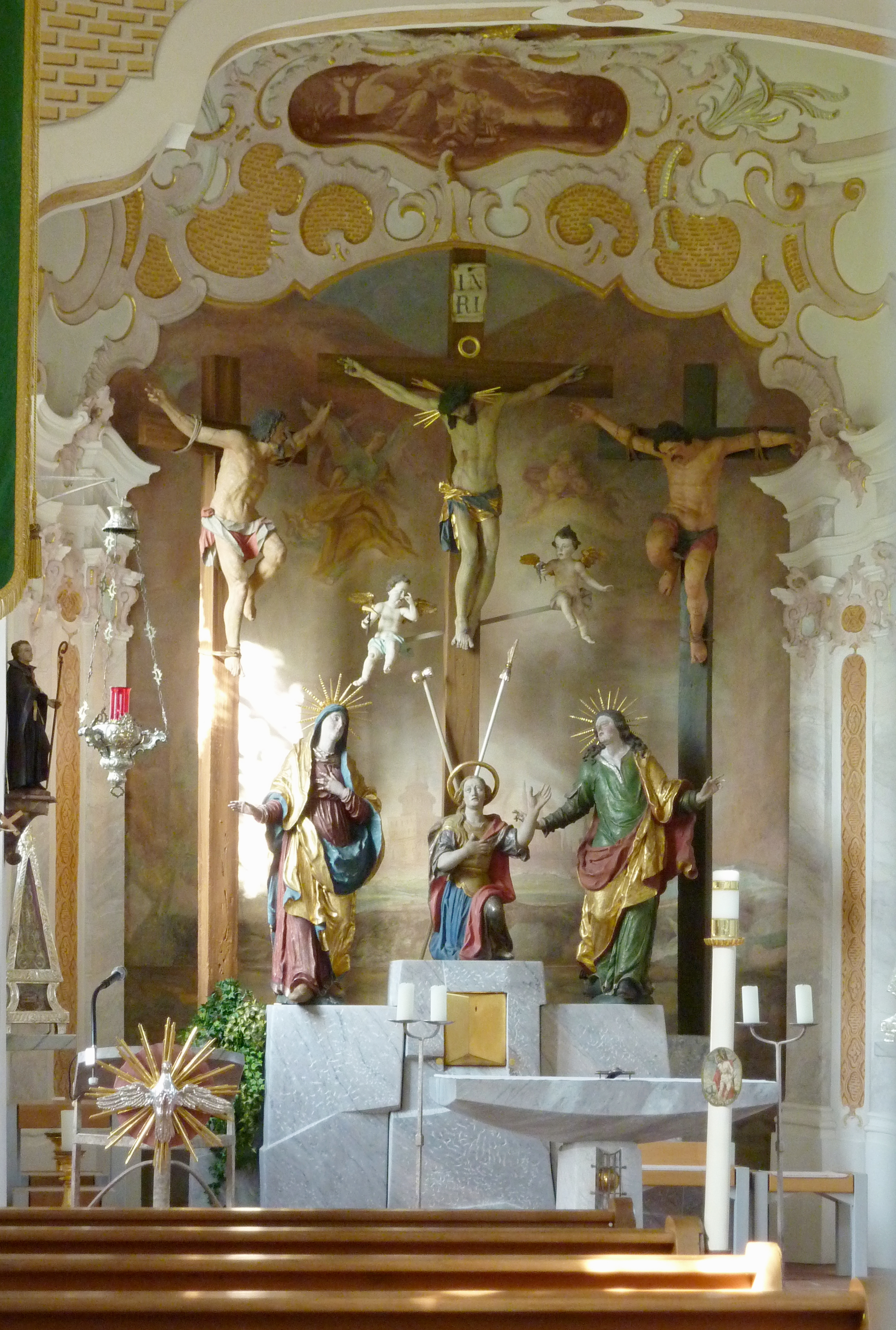 Katholische Wallfahrtskirche Heilig Kreuz in Mindelaltheim, einem Ortsteil von Dürrlauingen im Landkreis Günzburg (Bayern), 1698 von Jakob Albrecht erbaut, 1753 von Joseph Dossenberger d.J. erweitert, Hochaltar mit Kreuzigungsgruppe, um 1710/20